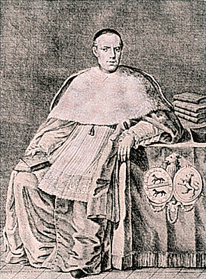 Retrato de Félix Latassa